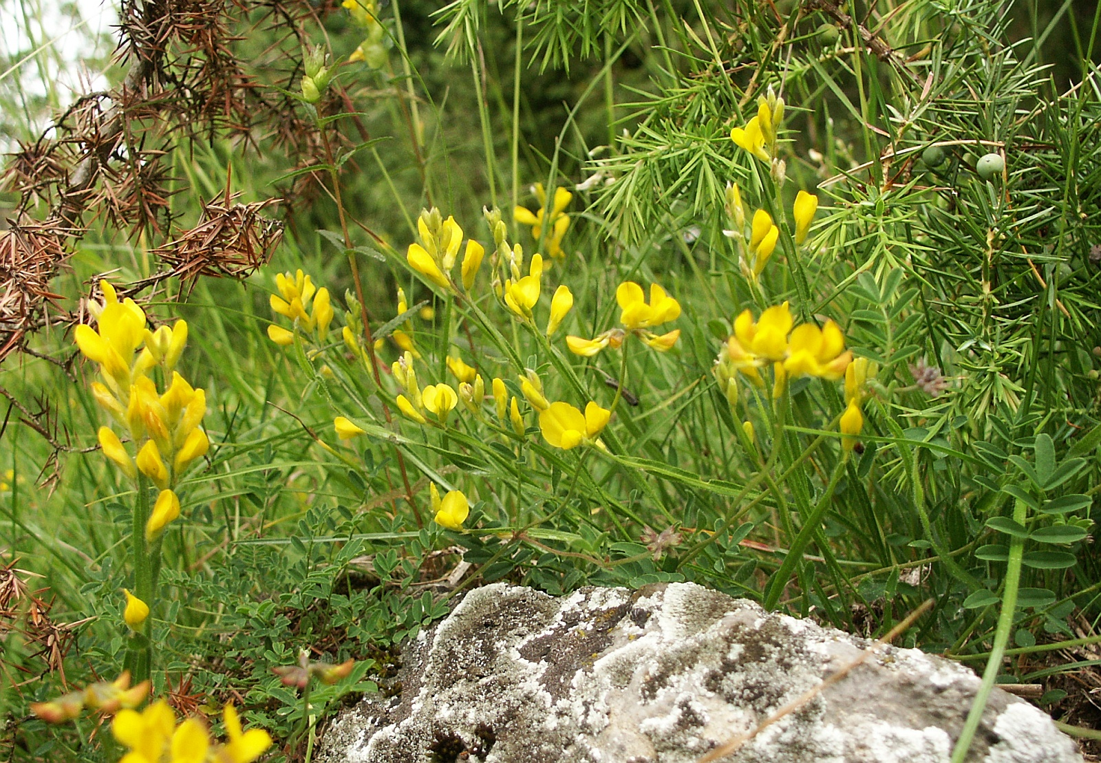 Genista sagittalis, Heckengäu, Germany